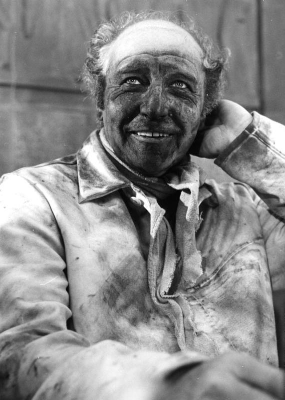 Bundespräsident Walter Scheel besichtigt auf Einladung der "Industriegewerkschaft Bergbau und Energie" die Kohlenzeche Erin des Mackweiler Bergvereins in Castrop-Rauxel am 19.3.1975